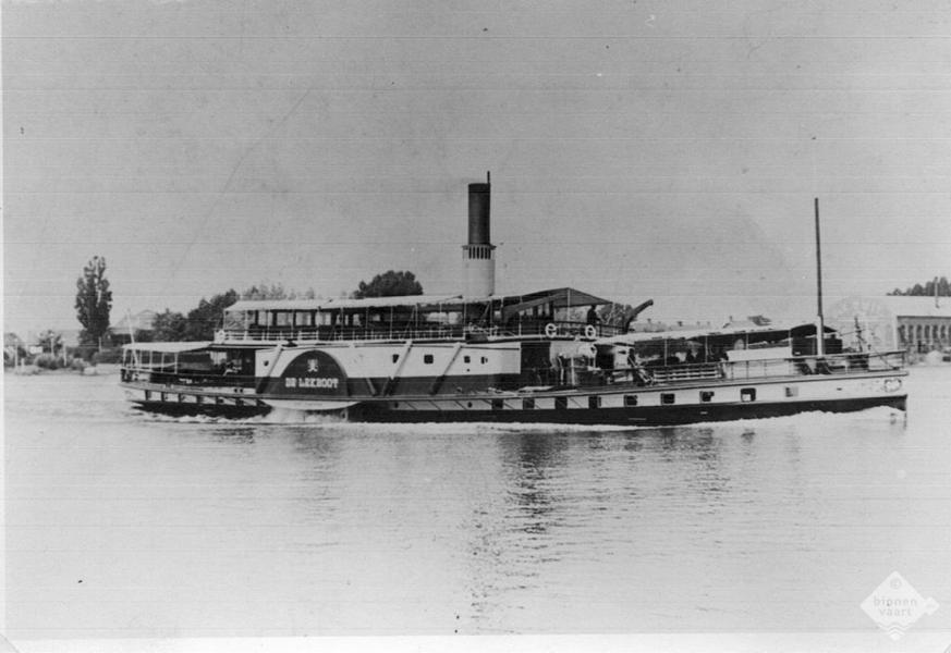 Afbeelding van De Lekboot, een schip uit 1903.